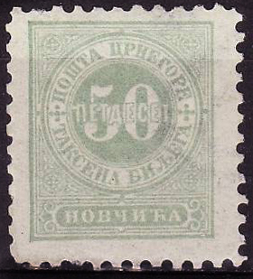 Доплатная марка Черногории из первой серии.